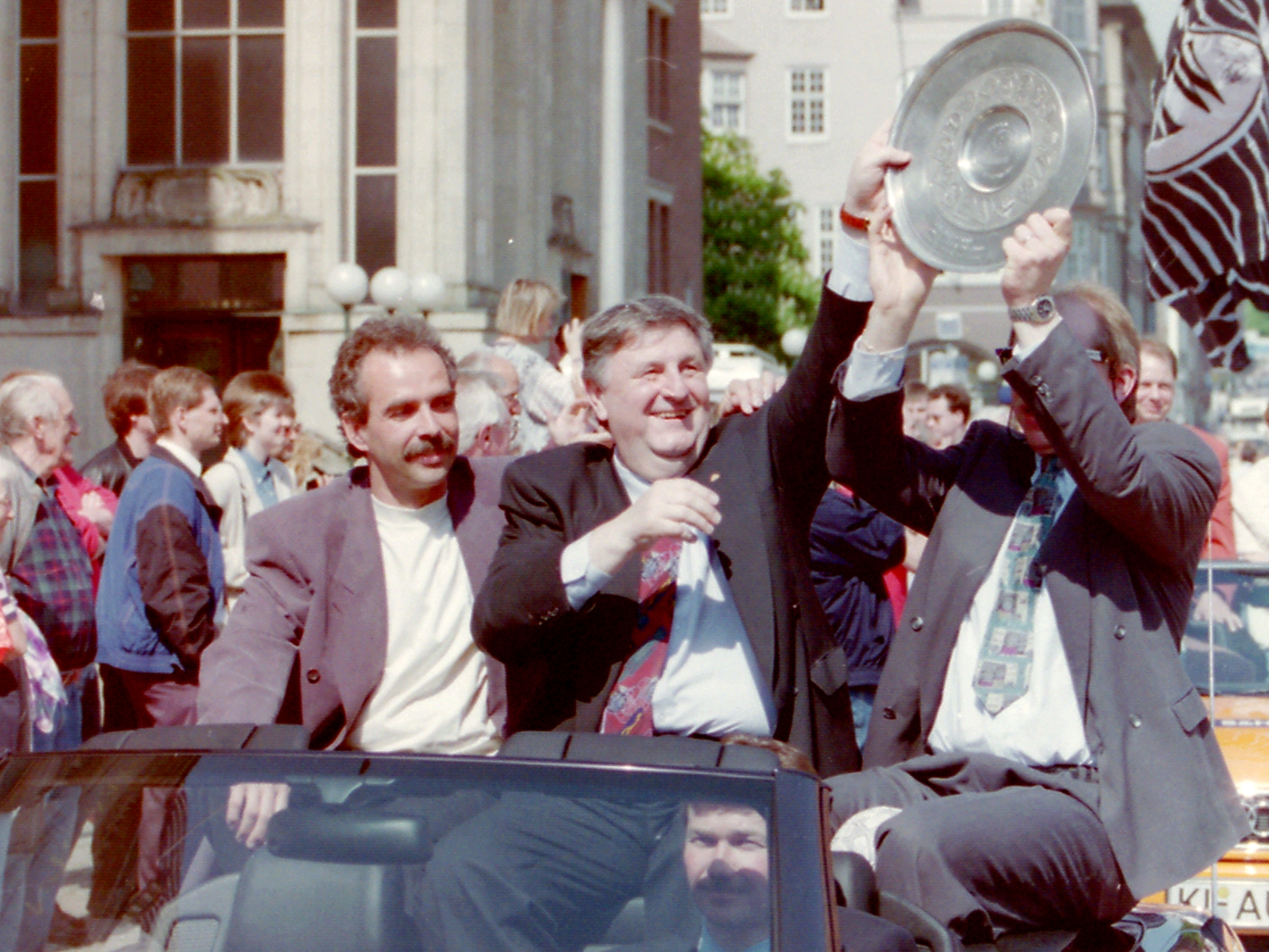 Heinz Jacobsen (mitte), Autokorso auf dem Kieler Rathausplatz nach dem Gewinn der deutschen Handballmeisterschaft 1994